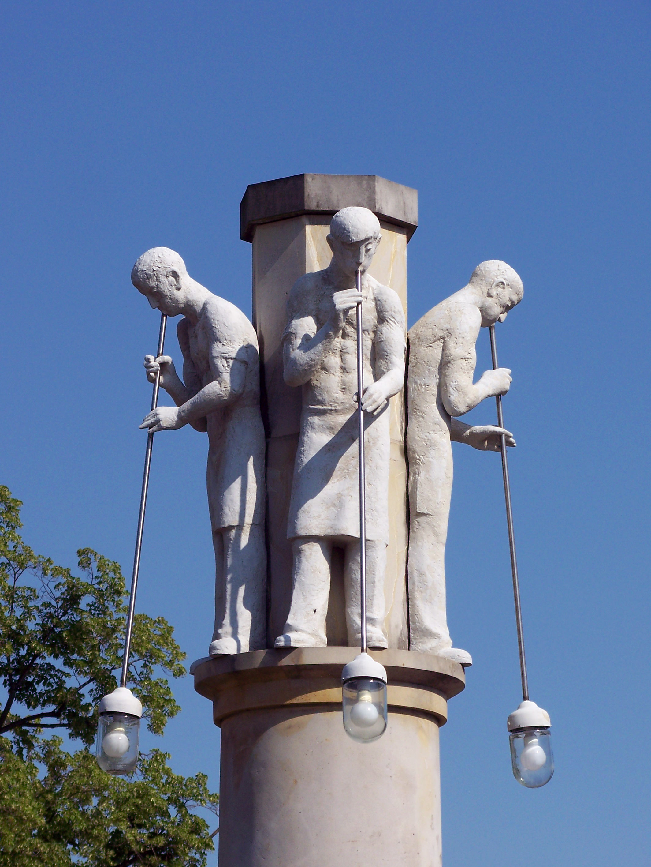 Der „Glasmacherbrunnen“ am Bahnhofsvorplatz zu Weißwasser, Oberlausitz